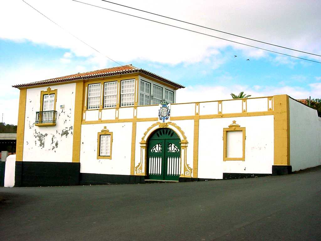 Solar dos Vieiras, São Mateus da Calheta, Facahda, Anga do Heroísmo